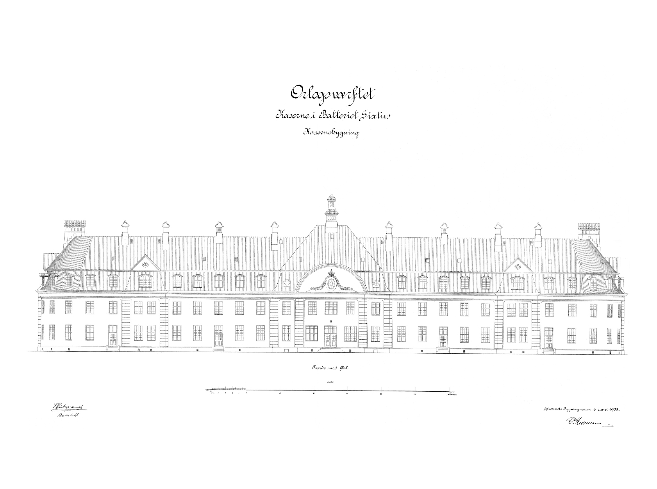 Arkitekt Valdemar Birkmands opstalt af den kommende kaserne i batteriet Sixtus 1908